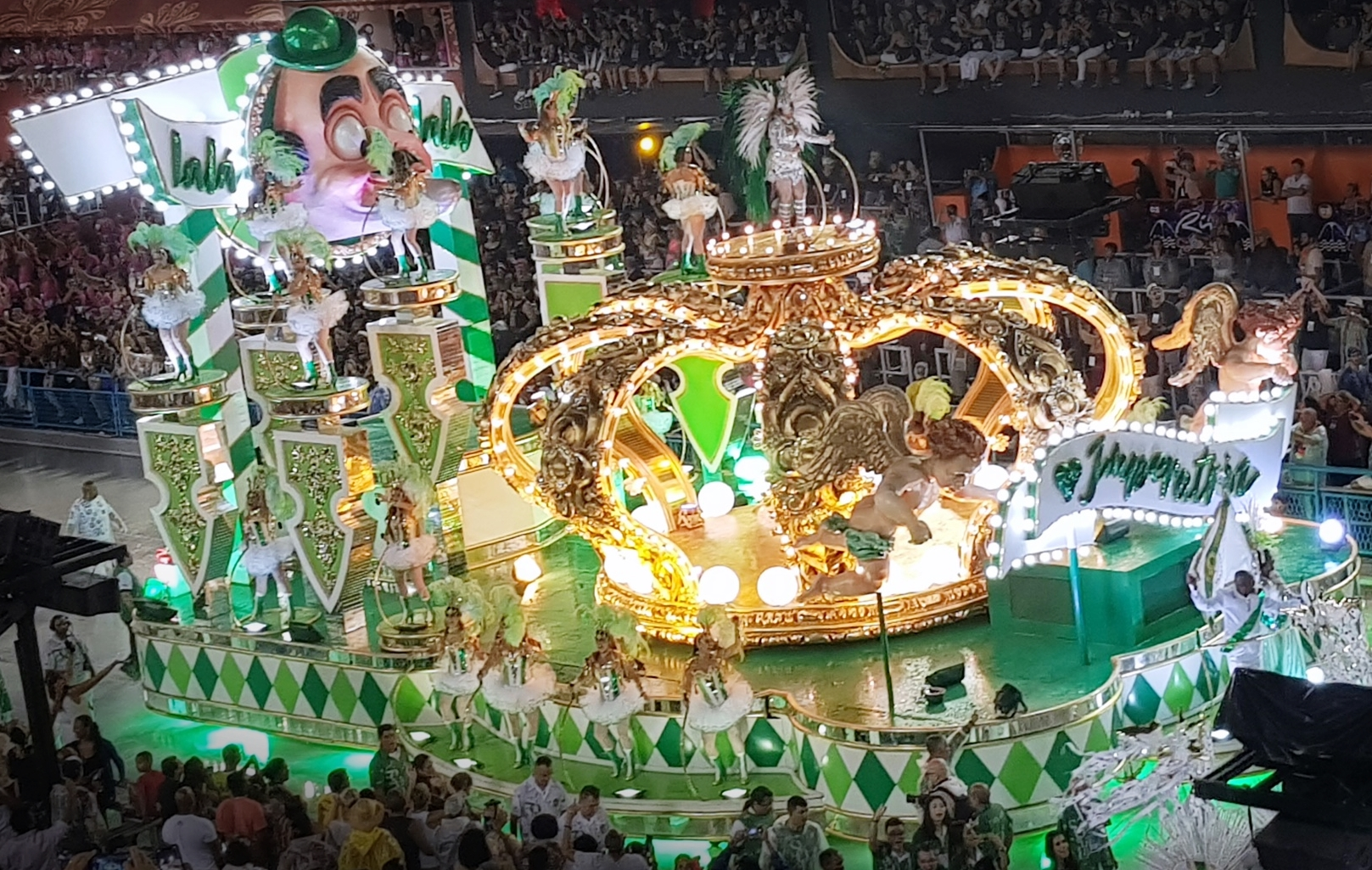 Desfile da escola de samba Imperatriz Leopoldinense, no carnaval de 2020, no Sambódromo do Rio de Janeiro.